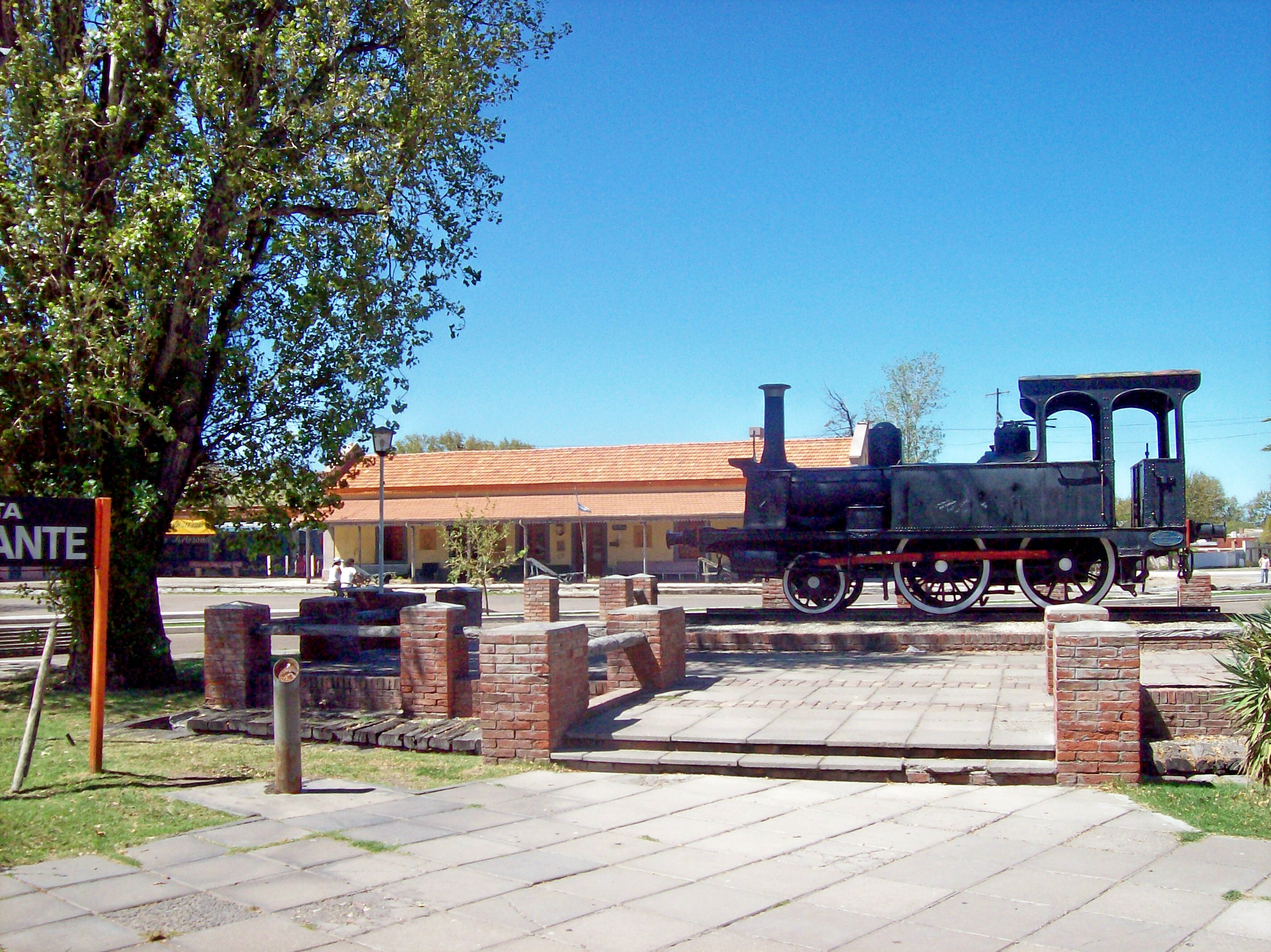 ciudad de San Rafael, en la provincia de Mendoza, Argentina. Al frente: Plaza de los inmigrantes, al fondo abandonada estación de tren utilizada como museo